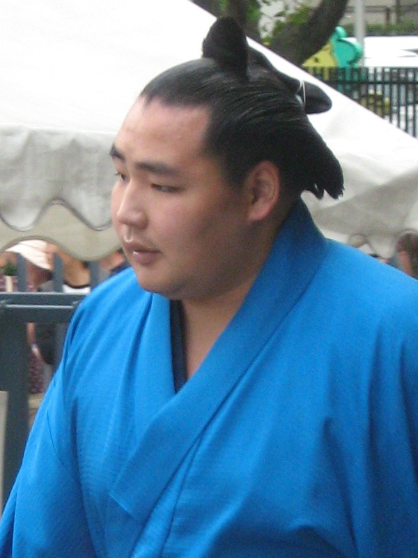 Kakuryū Rikisaburō